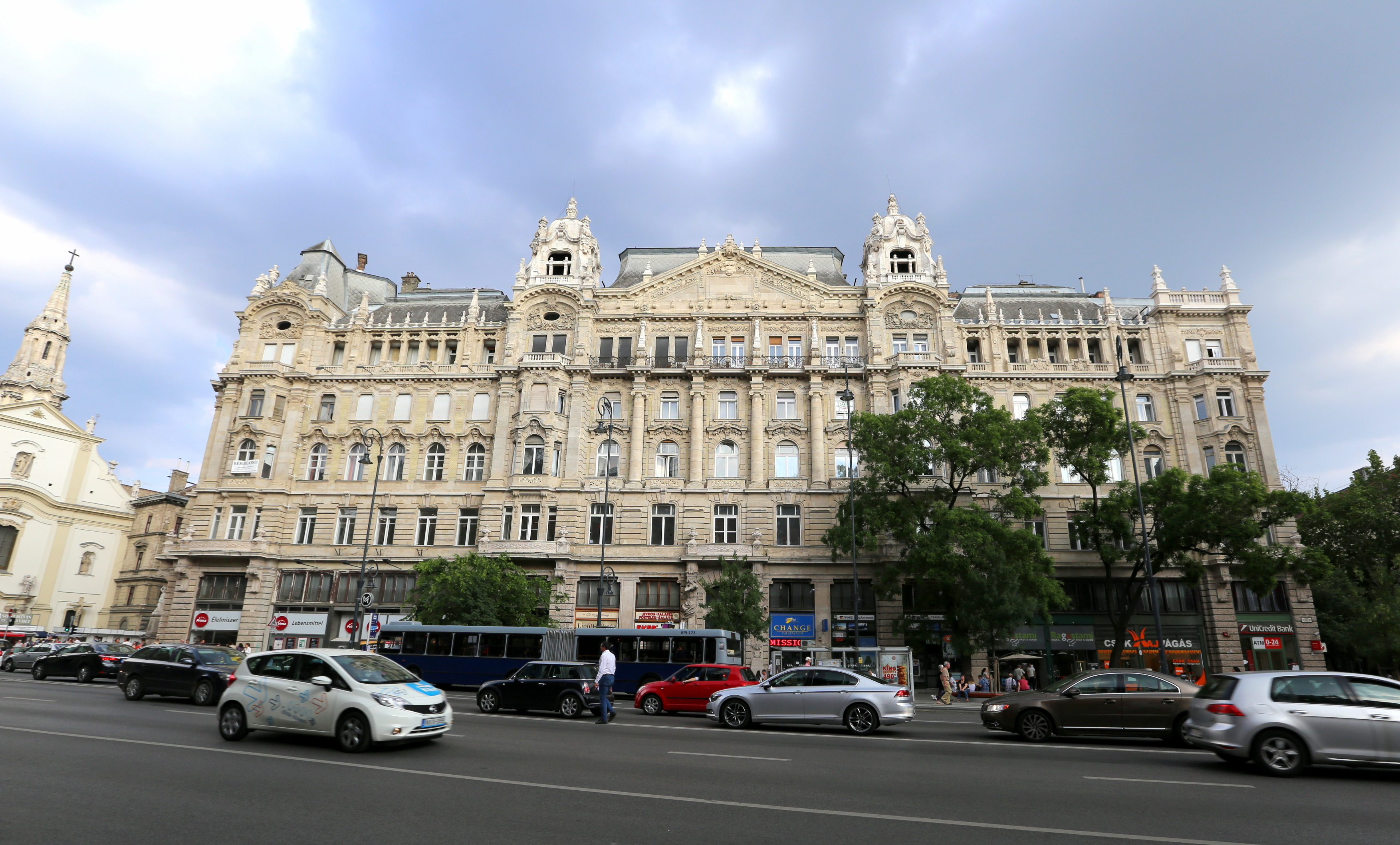 Ferenciek tere 2. - A századforduló építészetének egyik érdekes épülete a valamikori "Királyi bérpalota" (Korb Flóris (tervező), Giergl Kálmán (tervező), 1901 1902?), melynek építtetője a Császári és Királyi Magán családi Alapok. késő-eklektikus építészet szecessziós épületdíszekkel Forrás